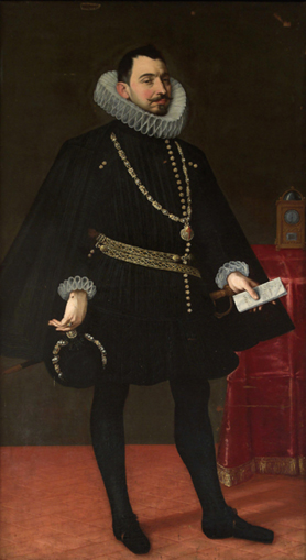 Retrato de Juan de Ciriza, marqués de Montejasolabel QS:Les,"Retrato de Juan de Ciriza, marqués de Montejaso"